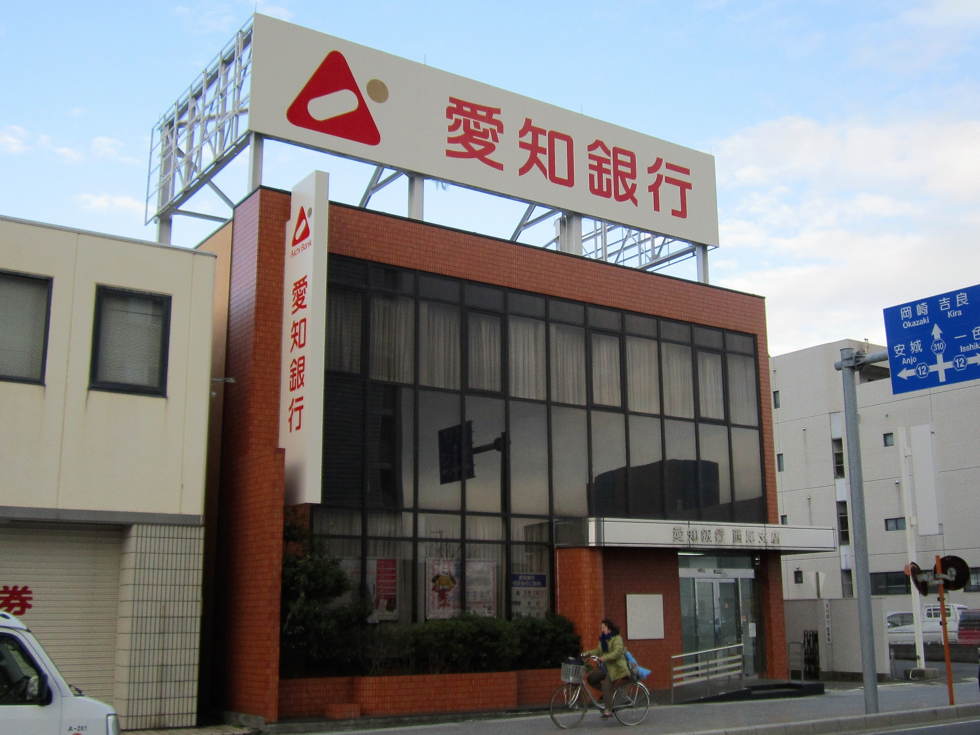 愛知銀行西尾支店（西尾市桜木町） Canon PowerShot A2200